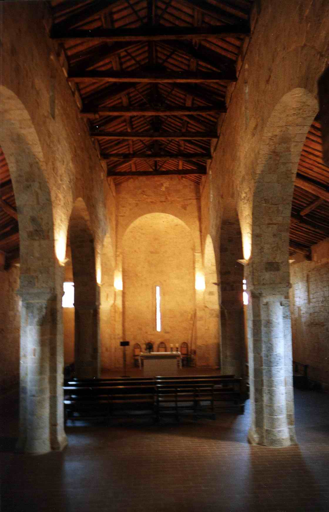 Sovicille (siena-Italia): l'interno della chiesa di Pernina